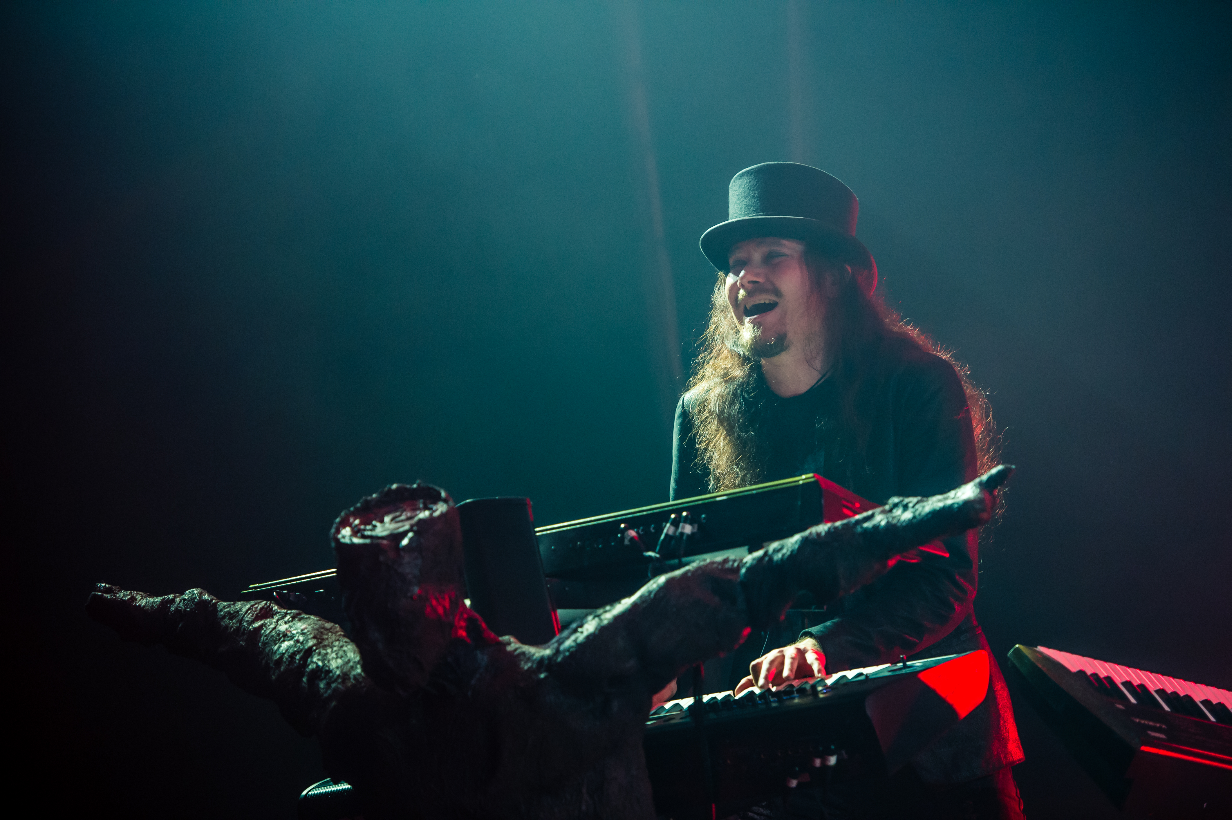 'Nightwish Endless forms most beautiful Tour 2015 Oberhausen'